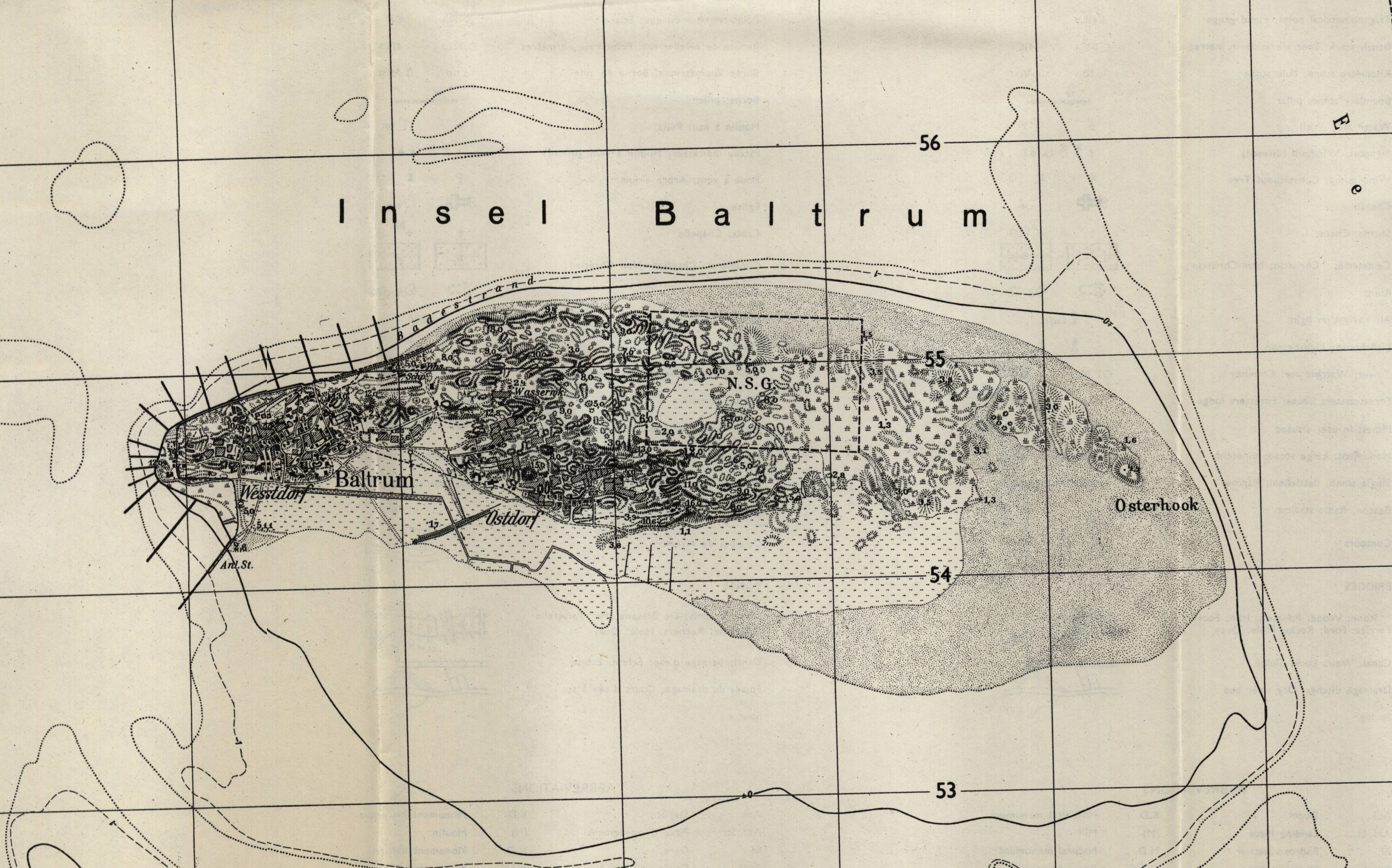 Baltrum 1955, TK 1 : 25.000 Blatt 2210, Ausschnitt